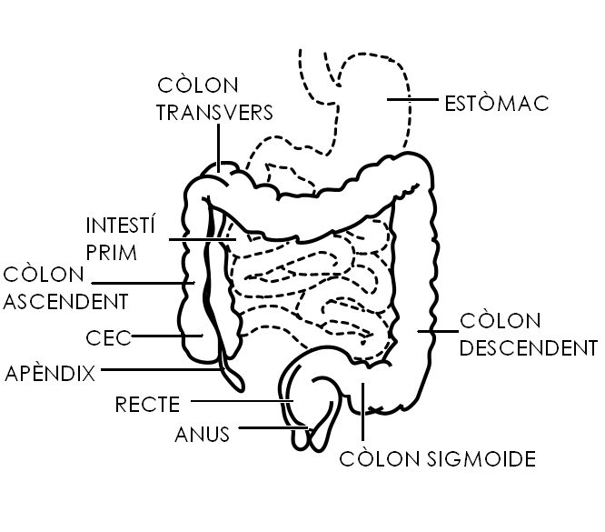 Diagrama de l'aparell digestiu a partir d'un altre diagrama en anglès.